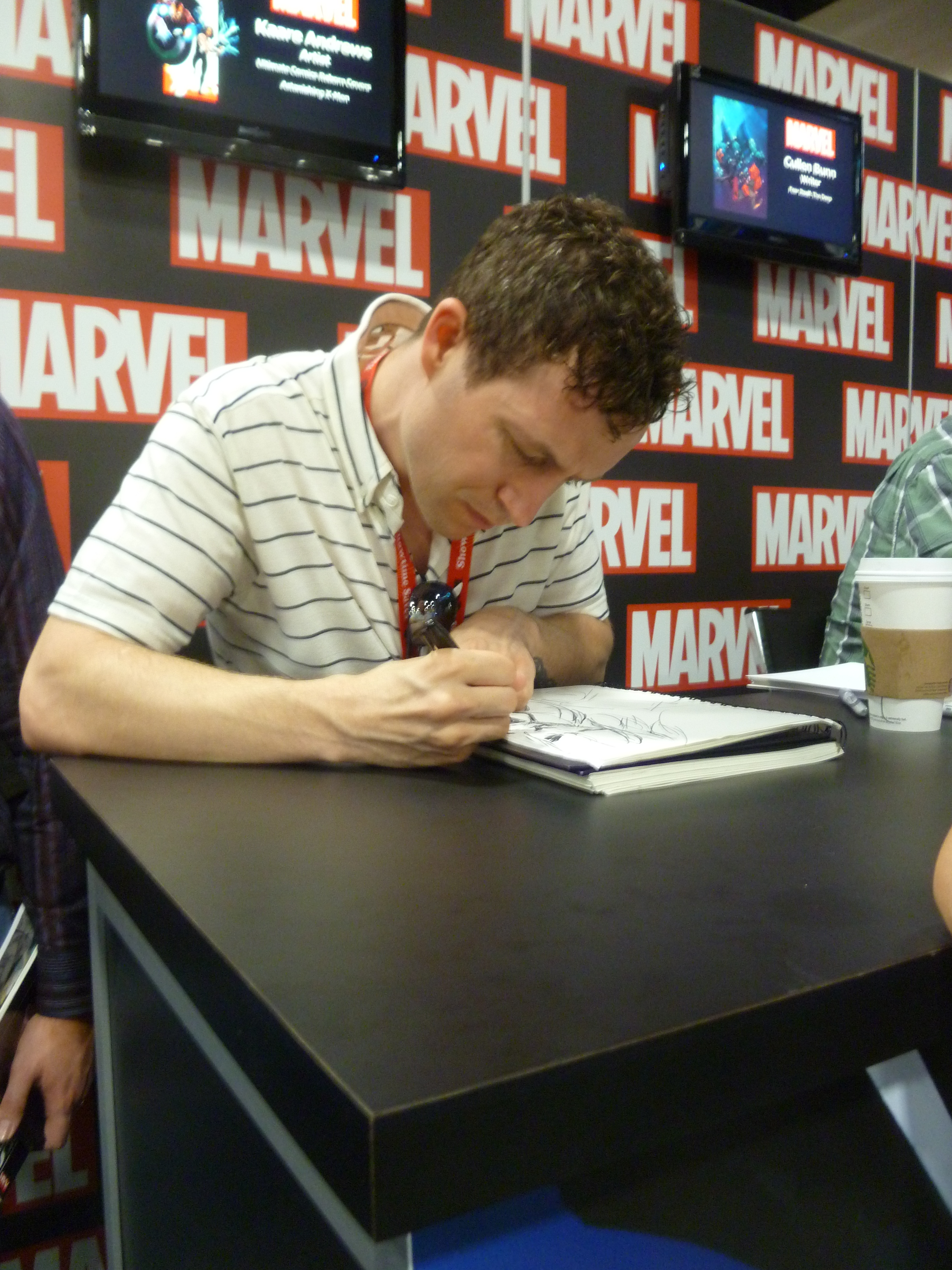 Lo scrittore, fumettista e regista Kaare Andrews ad uno stand Marvel